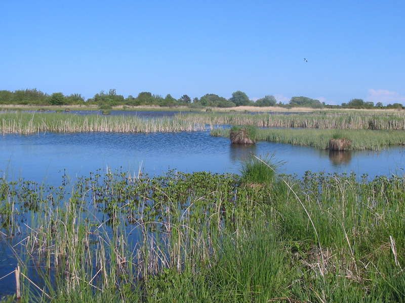 Siim Sepp, 2003